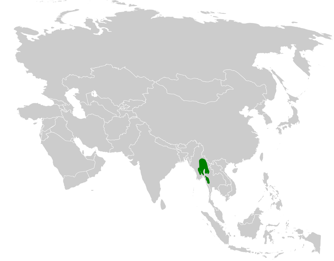 Cerasophila thompsoni distribution map, based on